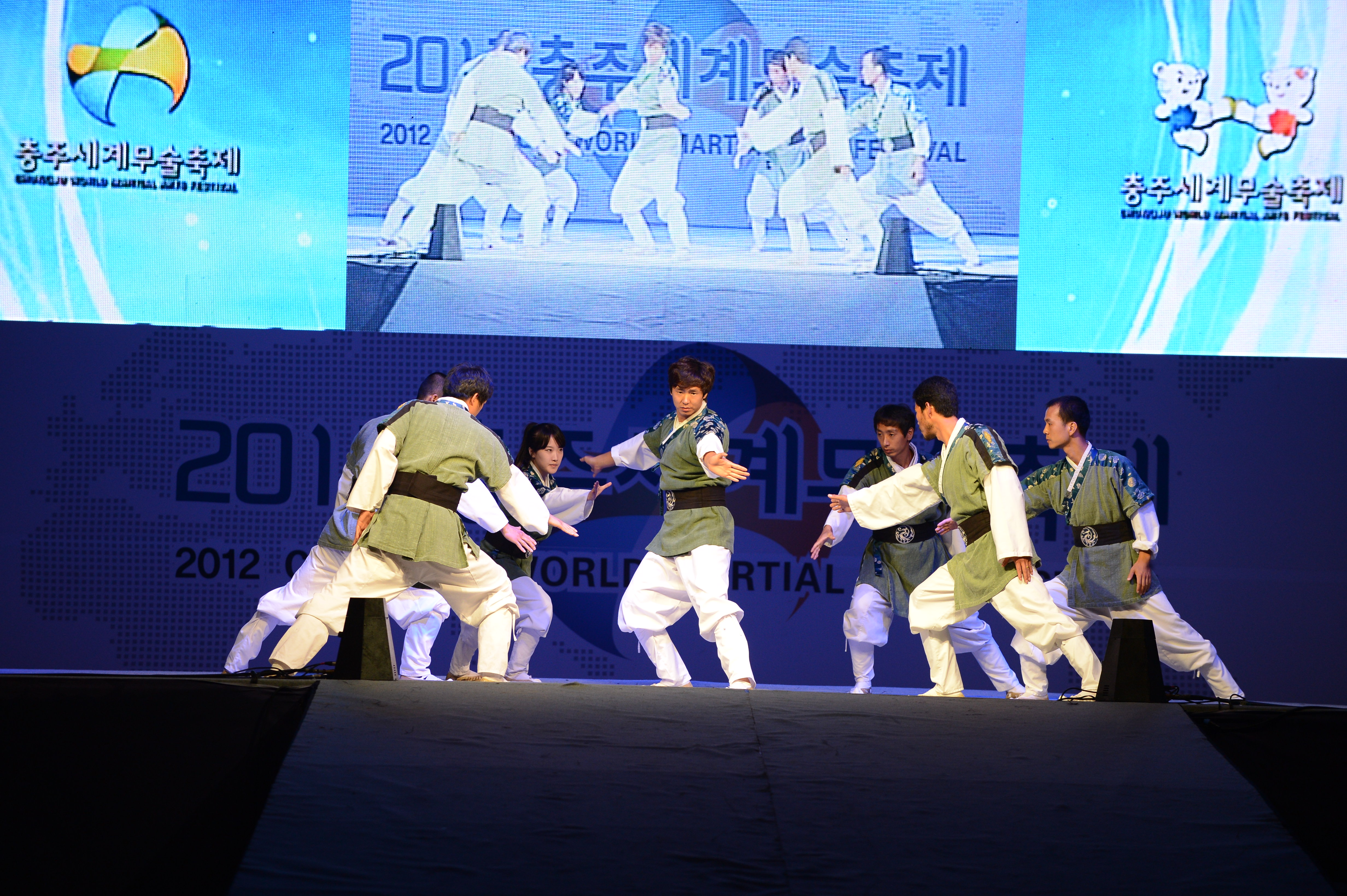 무술연무 국제대회로 매년 무술축제기간에 개최됨